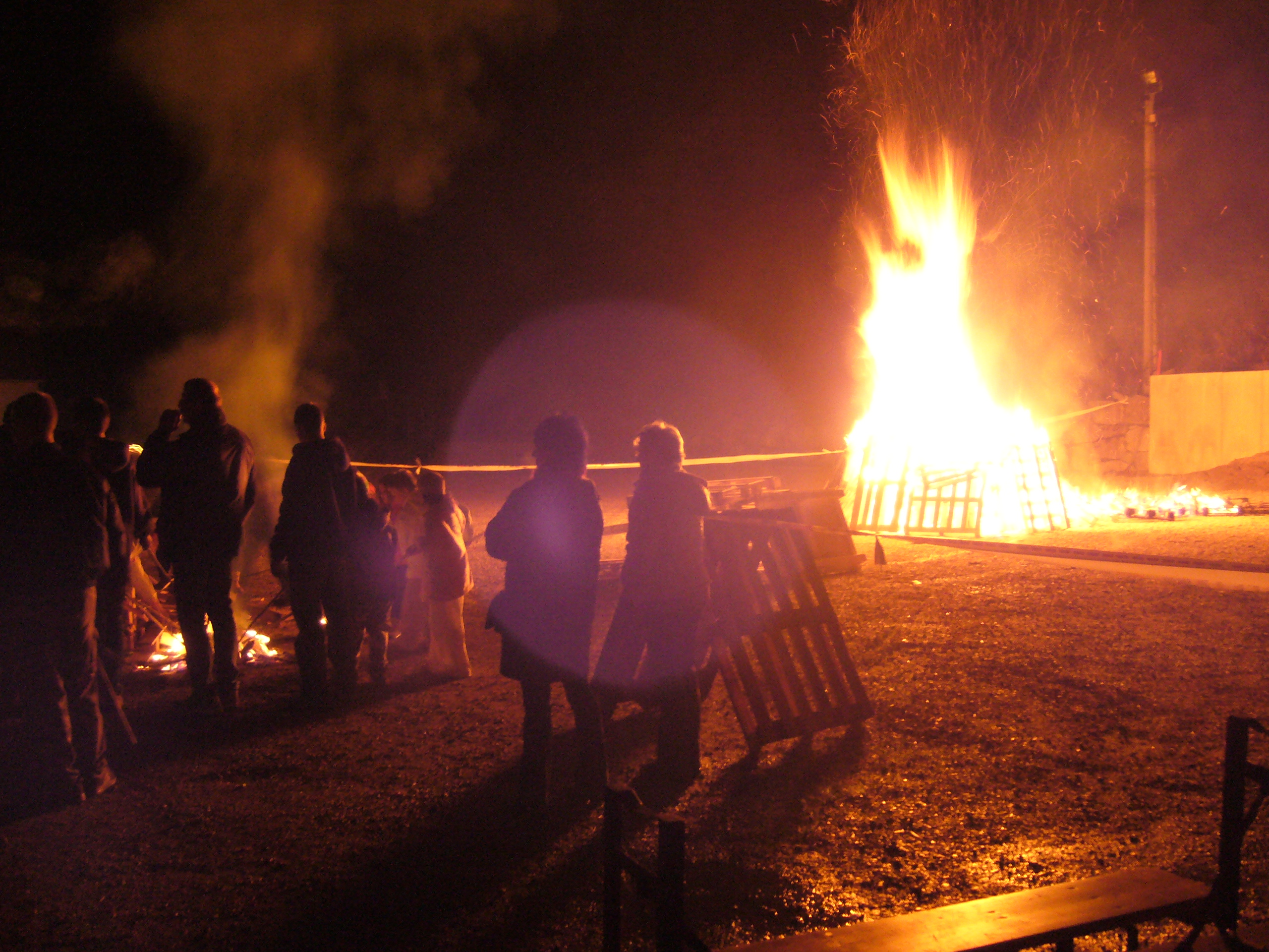 Feu de la Bure le 31 mars 2007 sur la place des fêtes